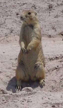 Corvus brachyrhynchos